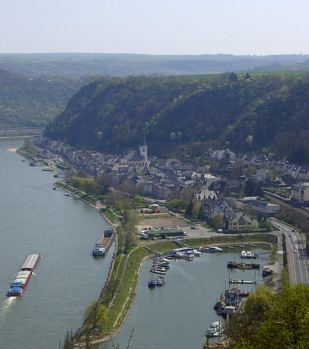 Beschreibung: Sankt Goar fotografiert aus Nordwesten Quelle: selbst fotografiert am 17. April 2004 Fotograf: Tobias Knab Lizenzstatus: Tobias Knab